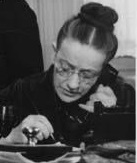 Pura Díaz- actriz